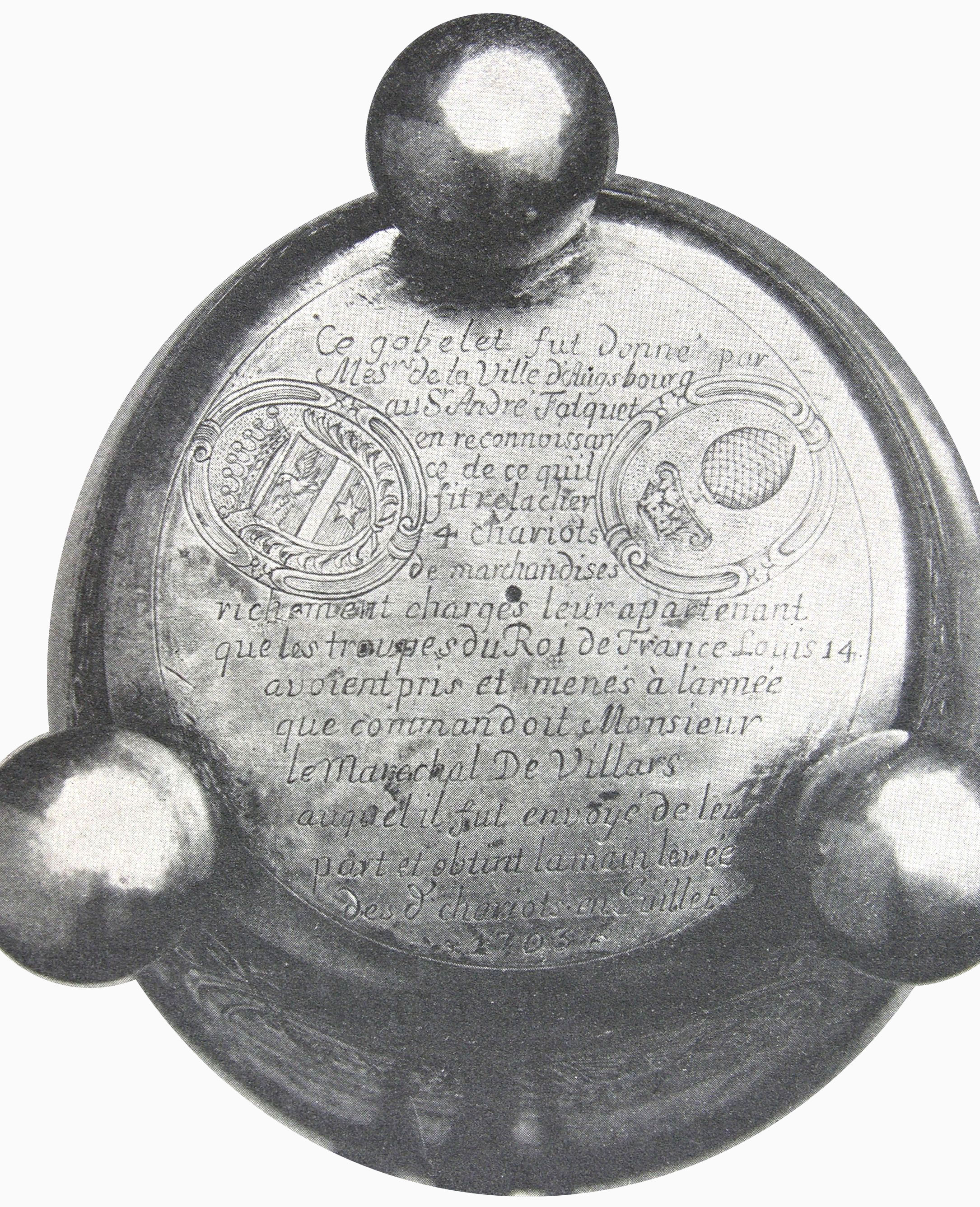 Gobelet d'André Falquet (Kunstgegenstand), Detail Unterseite.